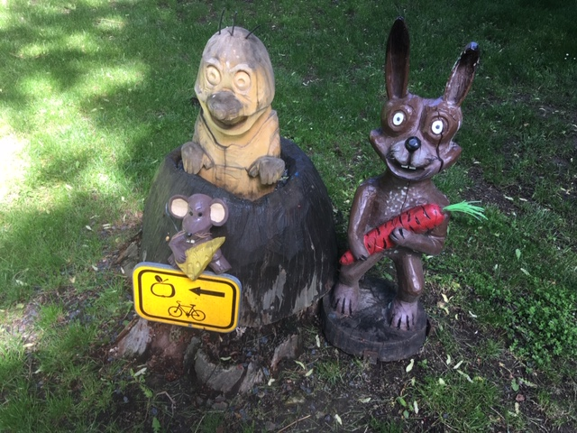 Značka pro ovocnou stezku